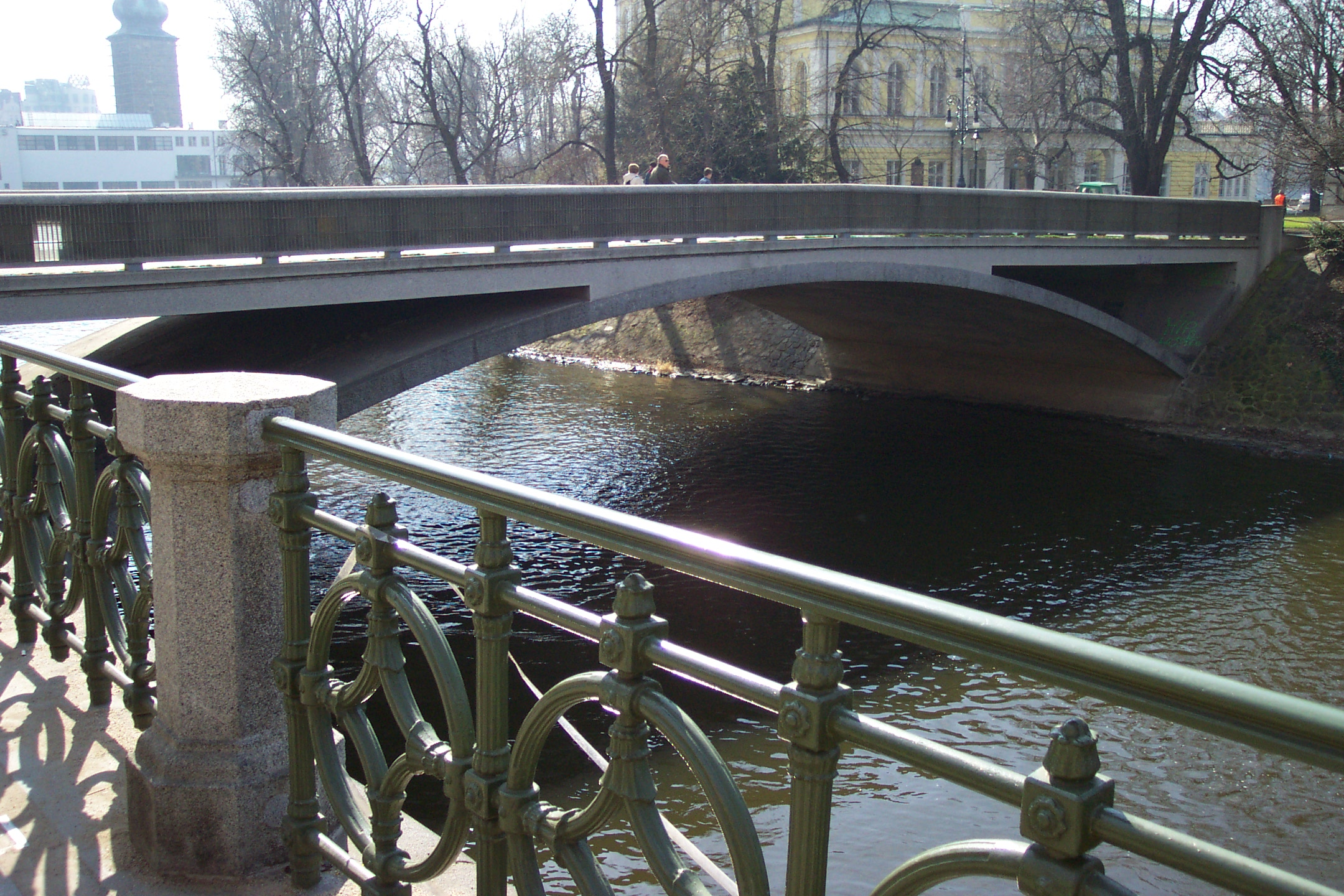 Prague, Nové město, small bridge - Praha, Nové město, Malý most